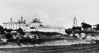 Белёвский Спасо-Преображенский монастырь